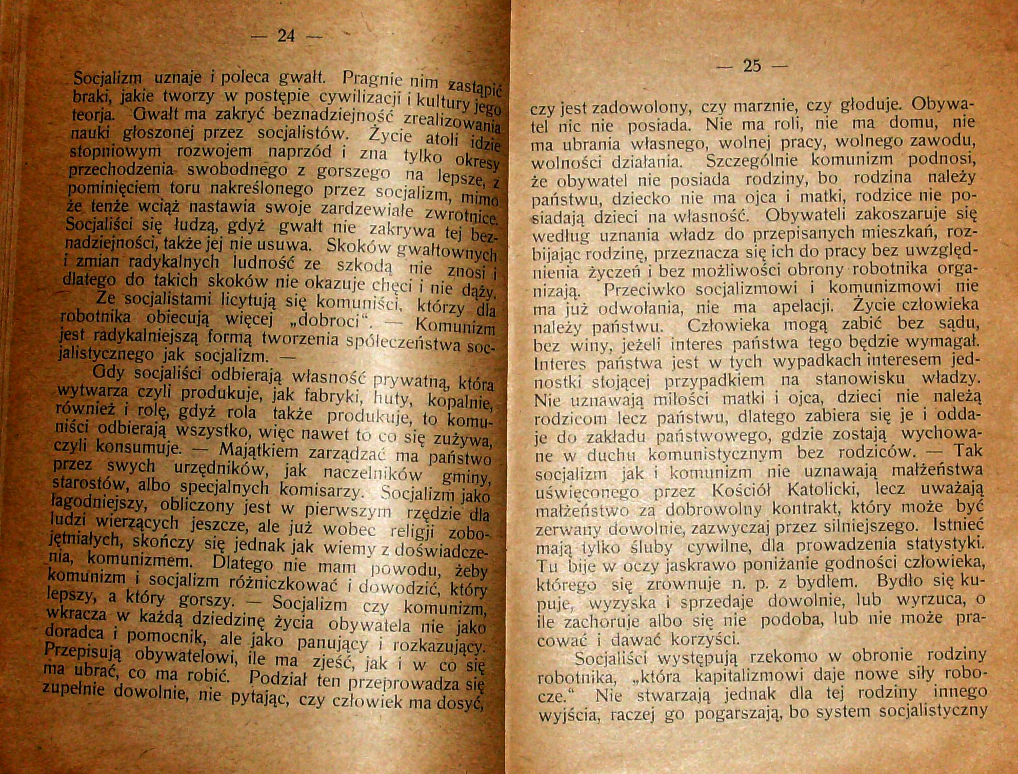 Stanisław Krzyżowski, Rozmyślania w czterdziestą rocznicę encykliki „Rerum novarum”, wydanej 15 maja 1891 r. przez papieża Leona XIII, Pszczyna 1931